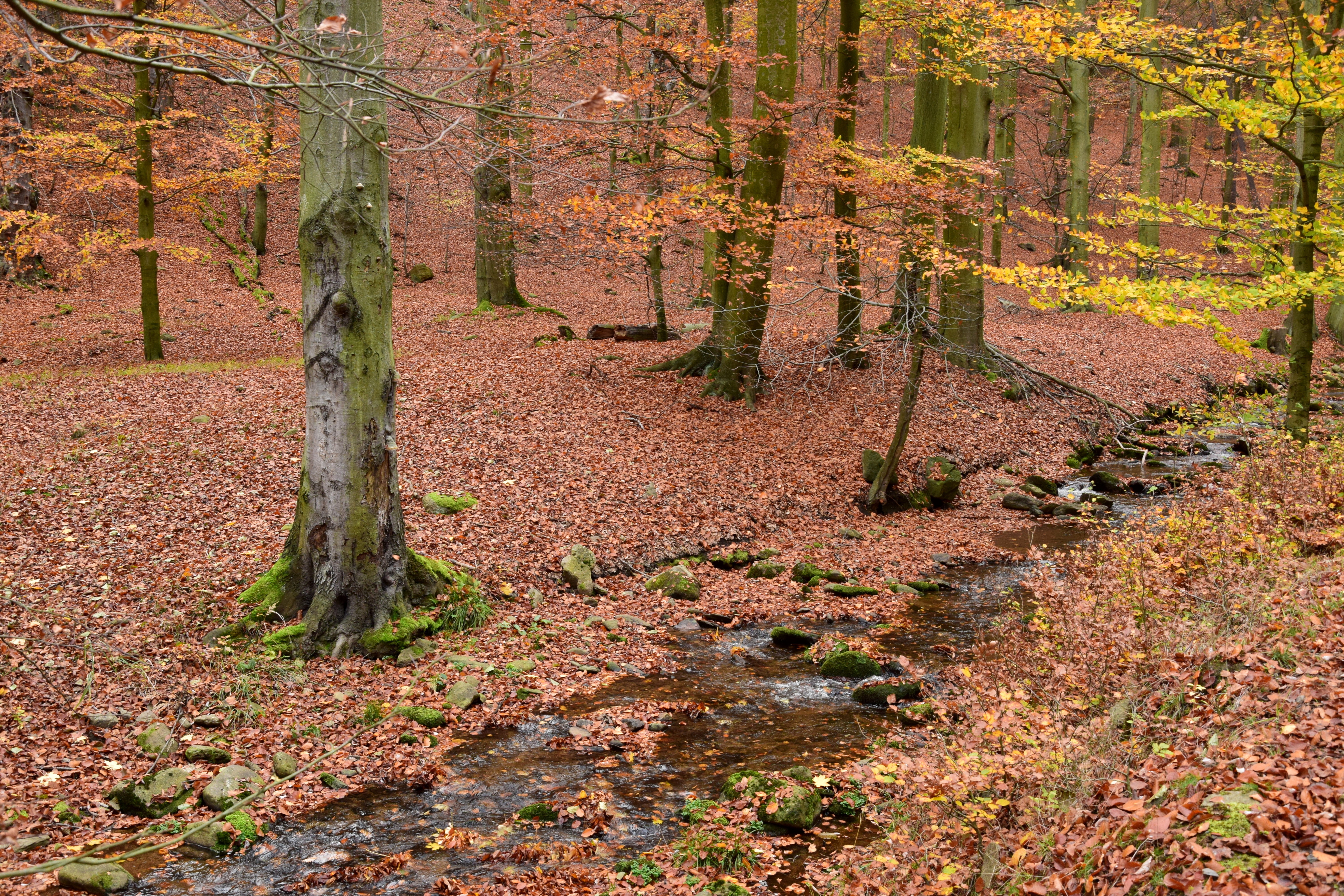 Přírodní památka Drmaly – Nivský potok (Lužec)